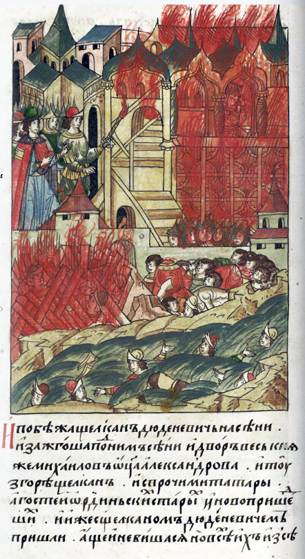 Щелкановщина. Народное восстание против татар в Твери. 1327. Миниатюра из Лицевого летописного свода XVI в. "Щелкан Дюденевич побежал в палаты, но палаты под ним подожгли и весь двор князя Михаила, отца Александра, и там сгорел Щелкан со всеми татарами. А гостей ордынских, старых и новых, которые пришли со Щелканом Дюденевичем, хотя они и не сражались, всех их [посекли, иных утопили, а иных в костры, как дрова сложив, сожгли.]"